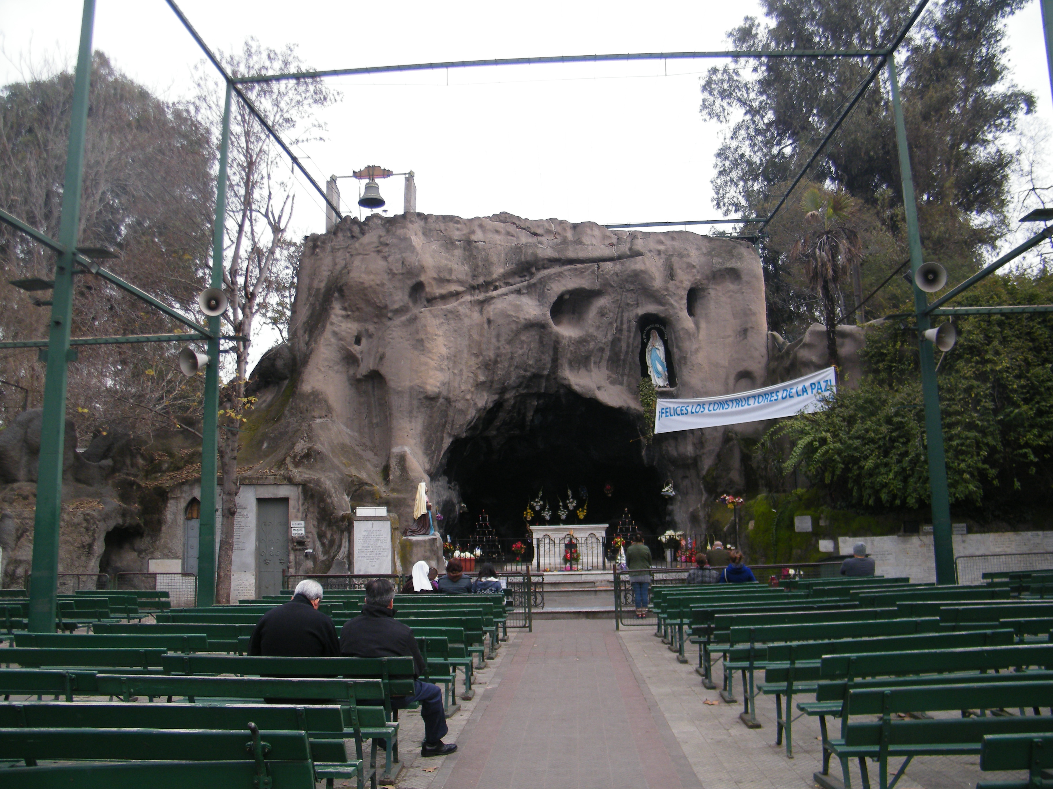 Fotografias del Santuario de Lourdes, incluyen imágenes de la Basílica, Gruta y Convento